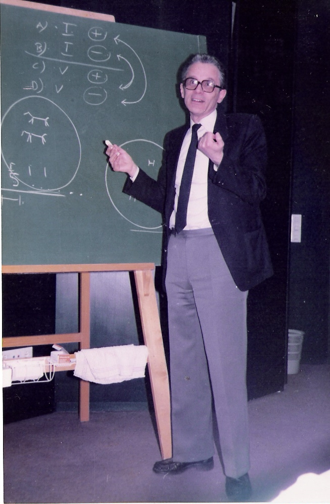 Bela Weissmahr 1982.